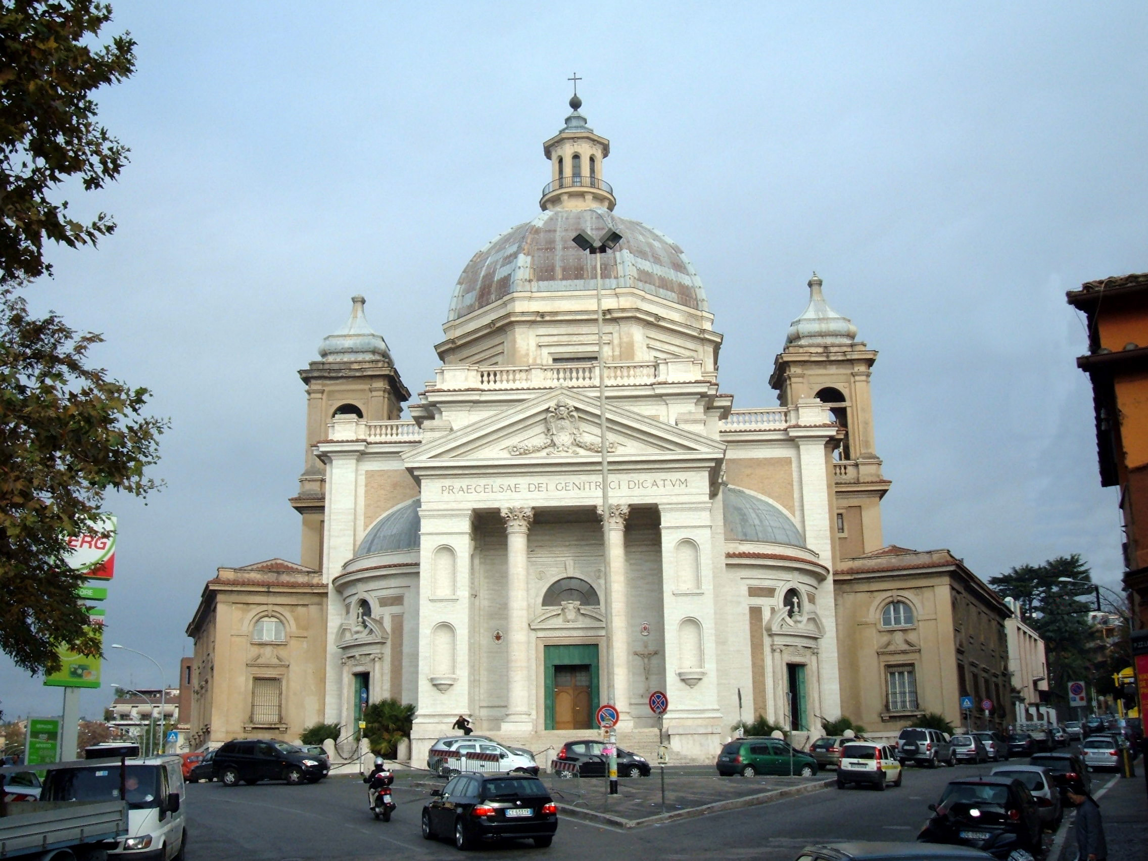 Chiesa della Gran Madre di Dio, a Roma, nel quartiere Della Vittoria.